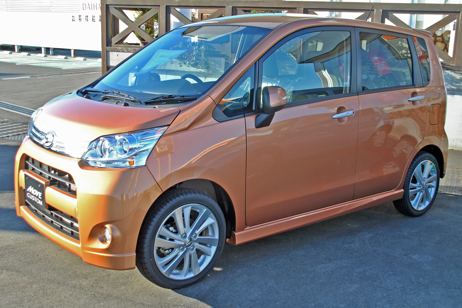 5代目ダイハツ・ムーヴカスタム